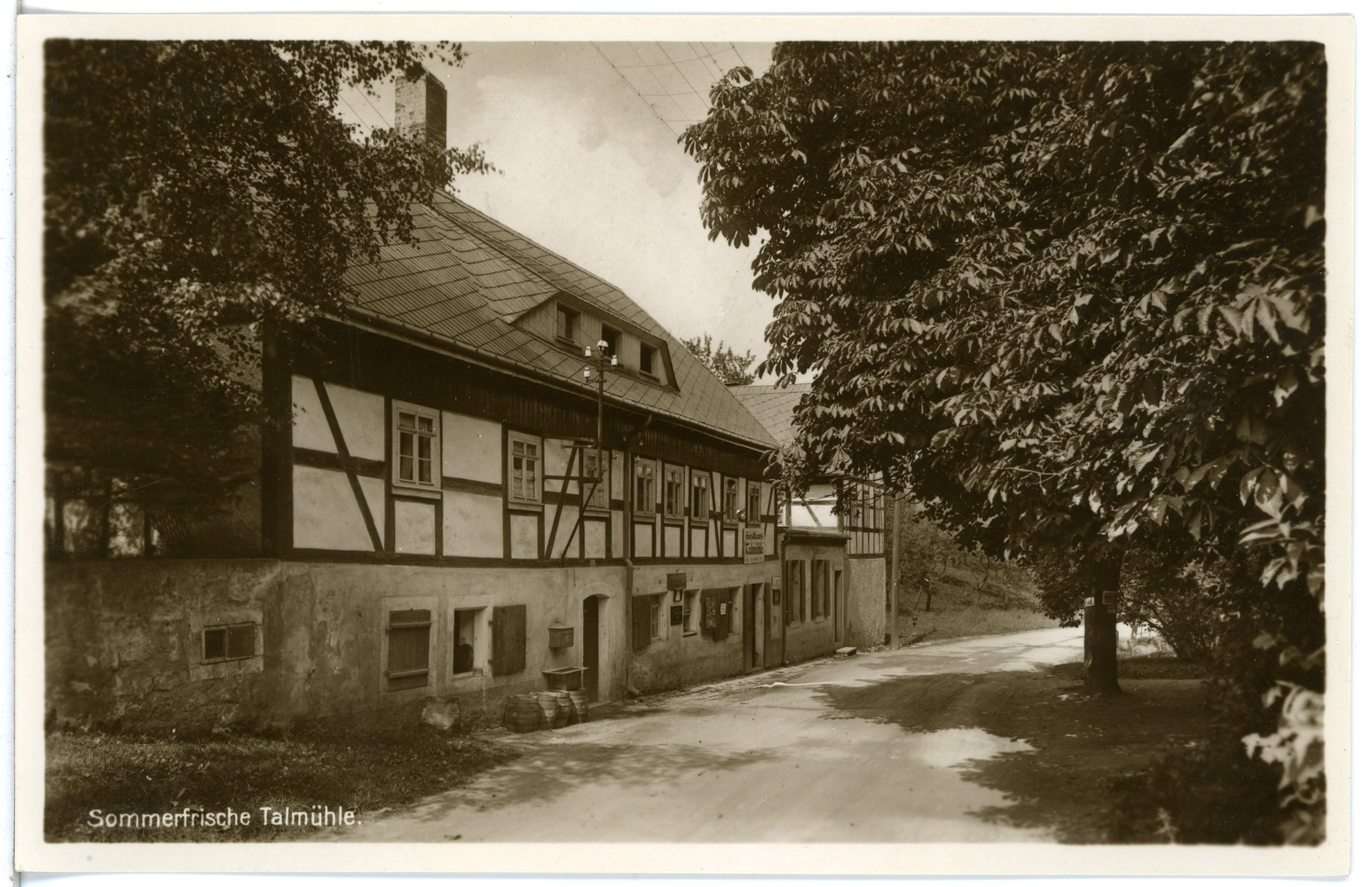 Hartha; Talmühle bei Hartha - Hintergersdorf This postcard is from publisher Brück & Sohn in Meißen ( postcard has a unique number 24225 and is available in a higher resolution at the publisher. This images was uploaded in a cooperation project between Wikipedians and the publisher.